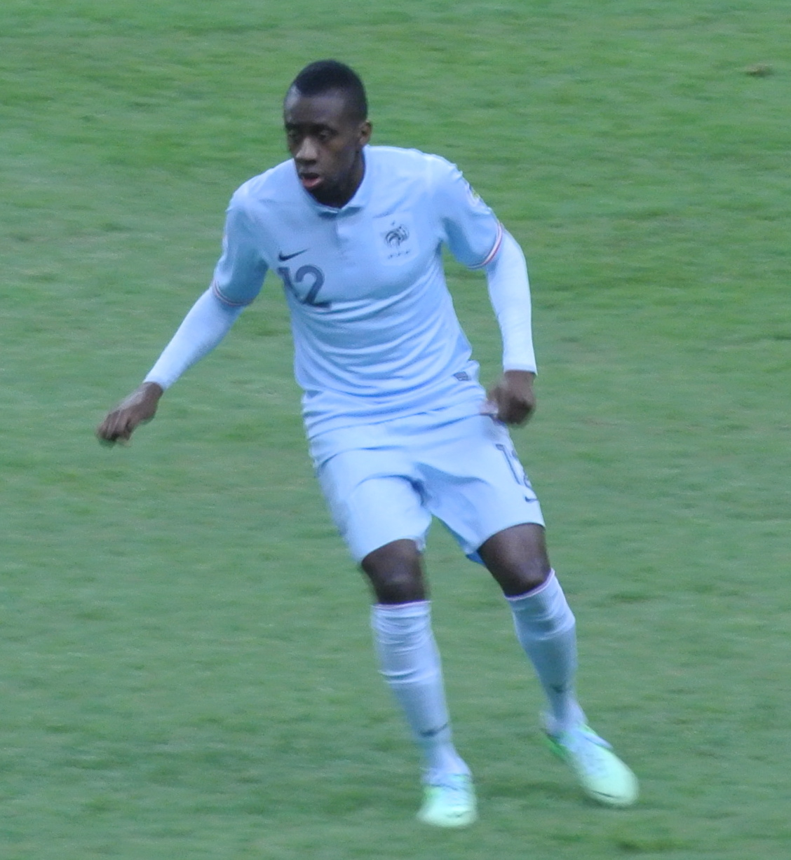 Matuidi avec la France face à la Georgie, le 22 mars 2013